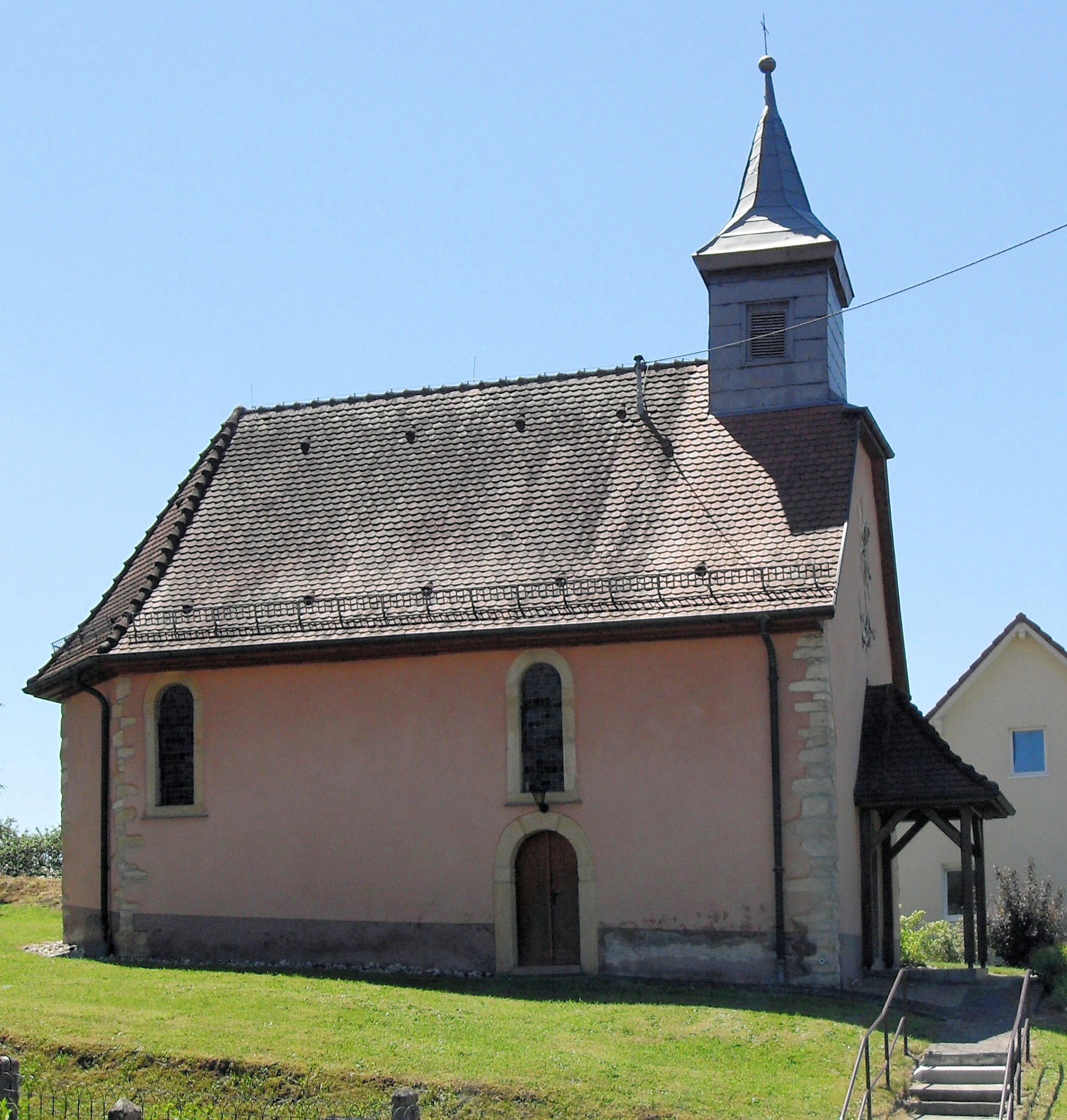 La chapelle Saint-Michel à Fulleren